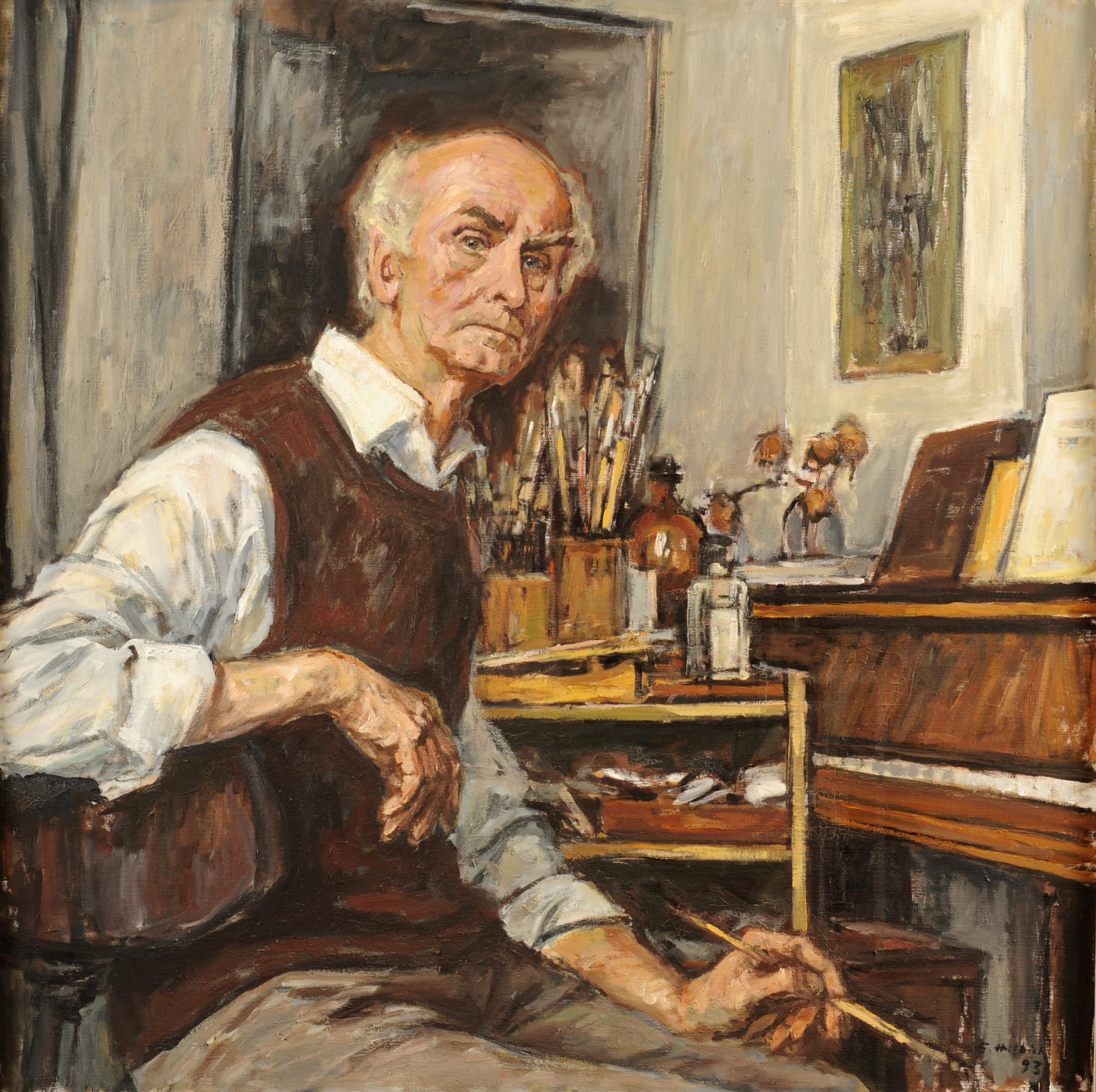 Selbstportrait des Malers Engelbert Hilbich, Gemälde Öl auf Leinwand, 1993. Foto: Markus Hilbich